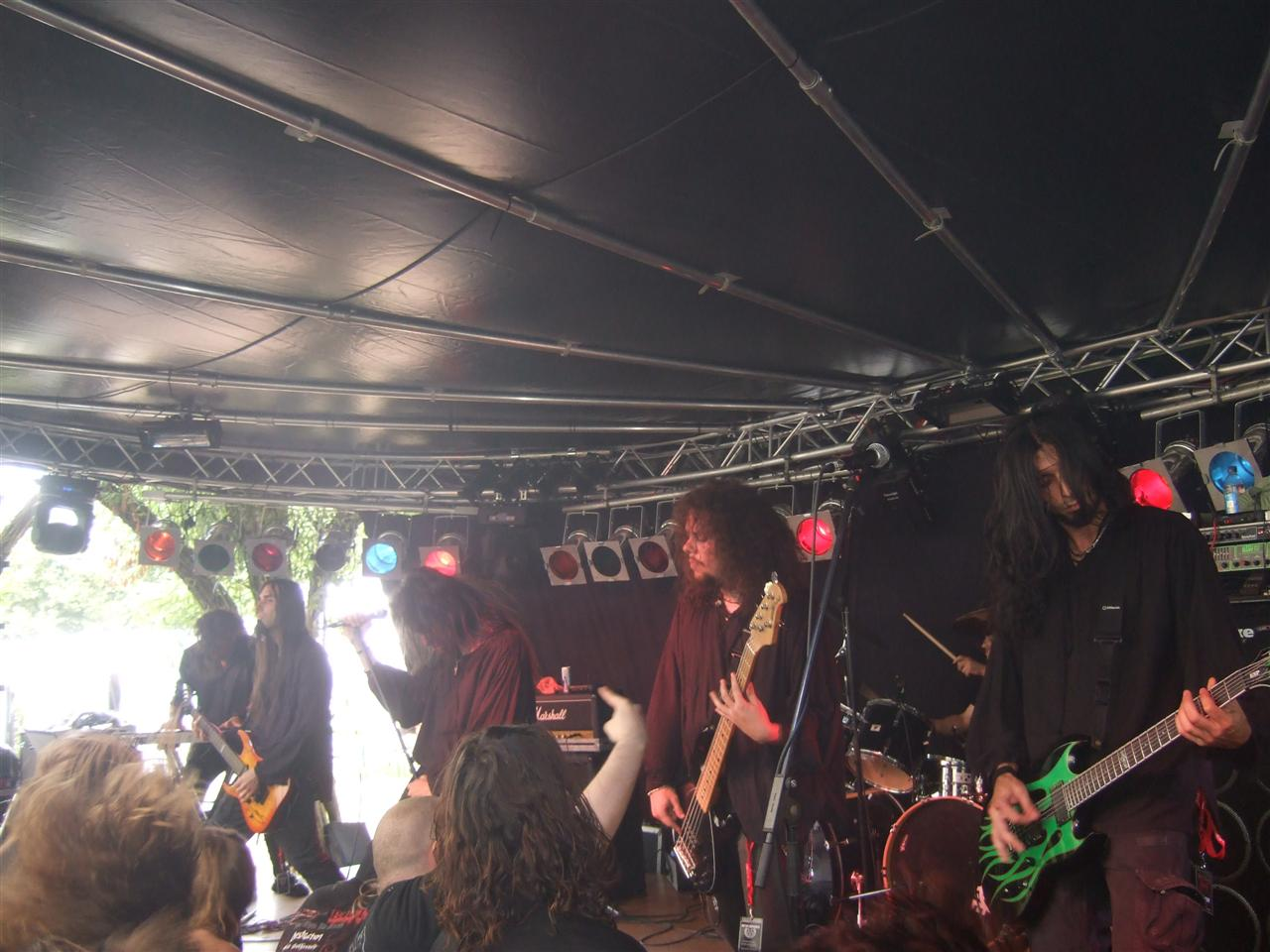 Stormlord Auftritt auf dem BiB 2008